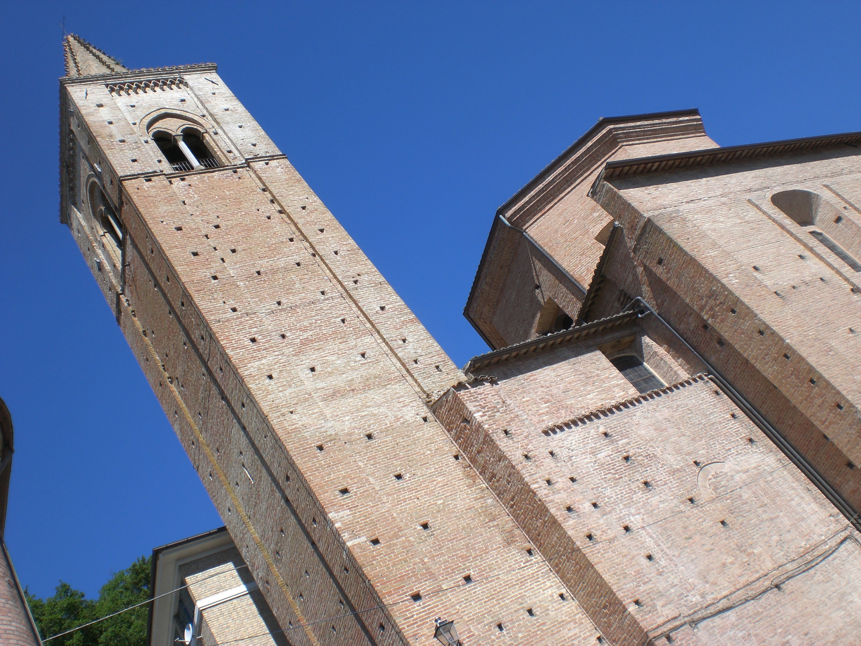 Chiesa di Sant'Agostino, XV secolo